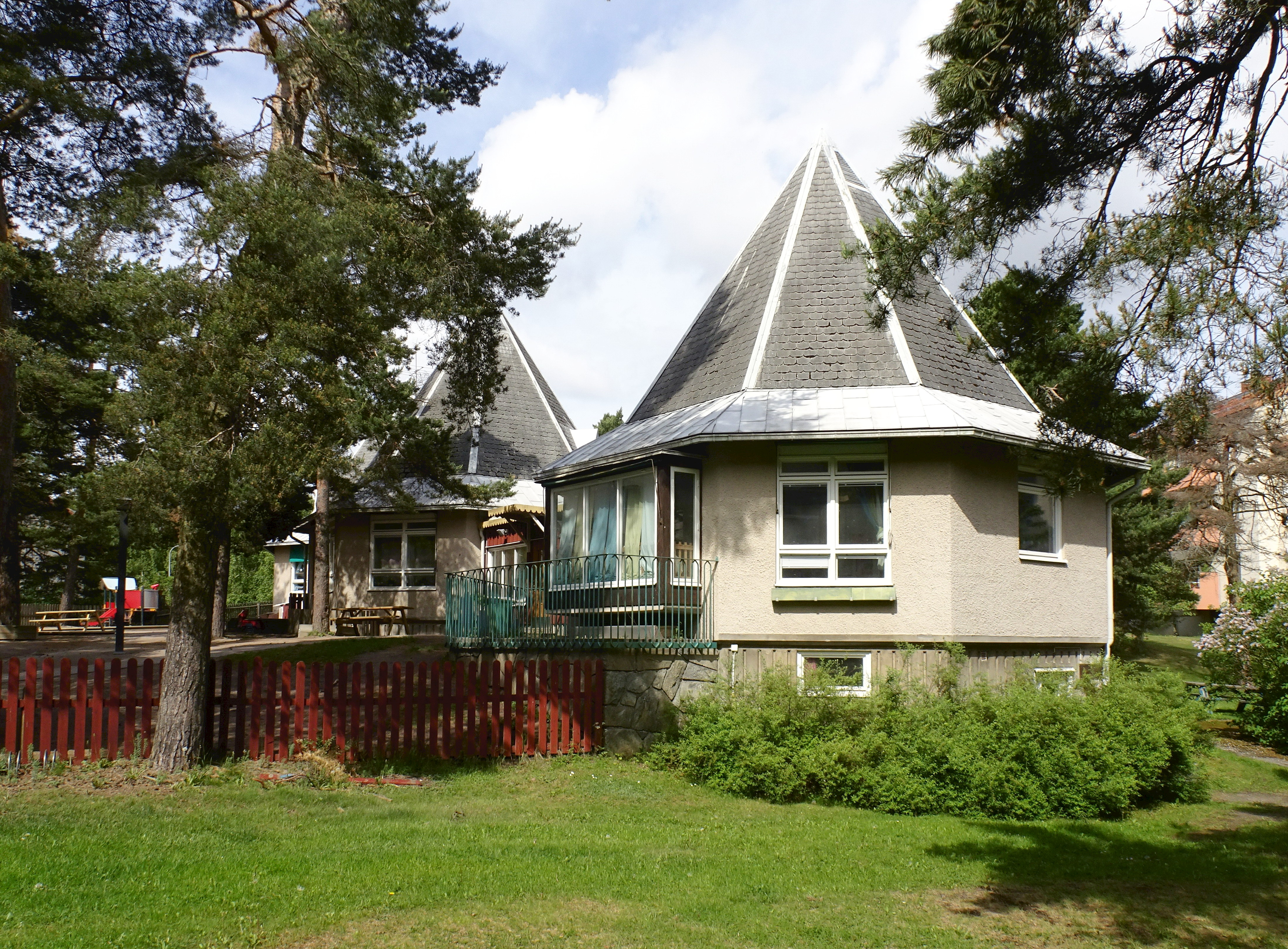 Förskola / daghem "Sköntorpsgården", Årsta, arkitekt Axel Grönwall